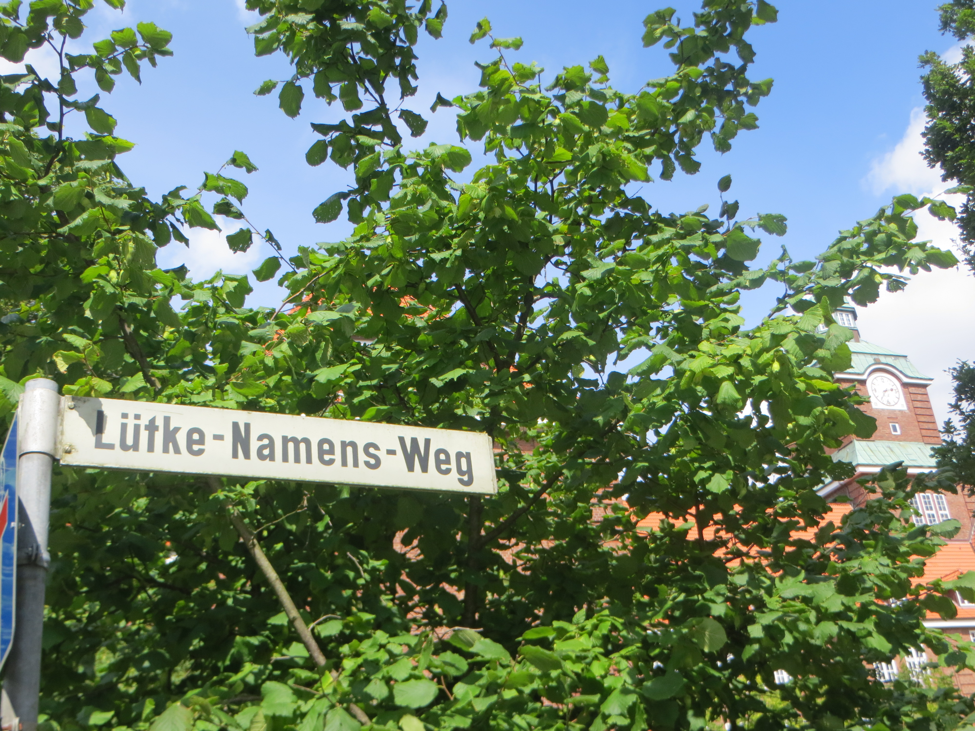 Straßenschild Lütke-Namens-Weg beim Alten Gymnasium, Flensburg, weiteres Bild